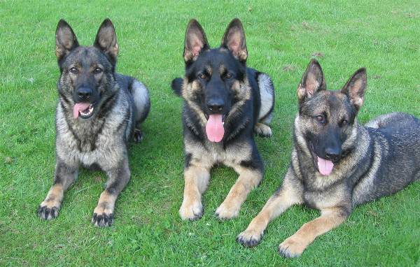 Drei Deutsche Schäferhunde